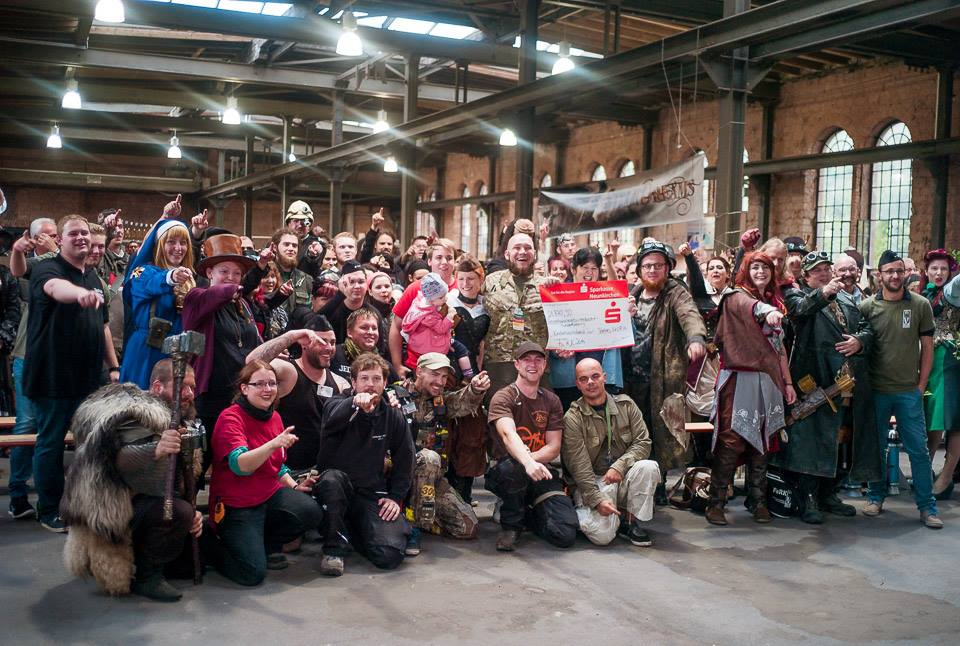 ankündigungspendensumme